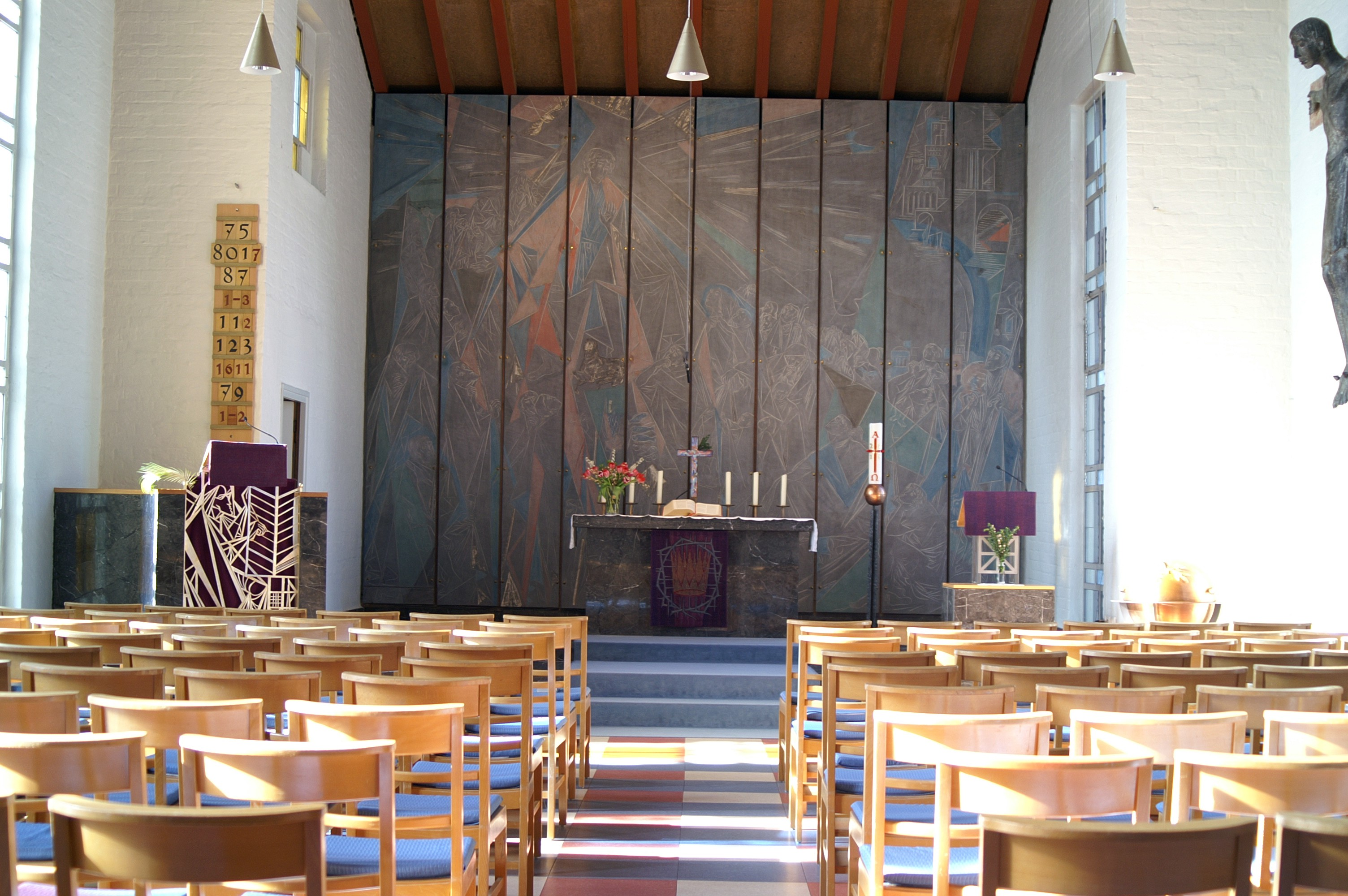 St. Matthäus Regensburg innen